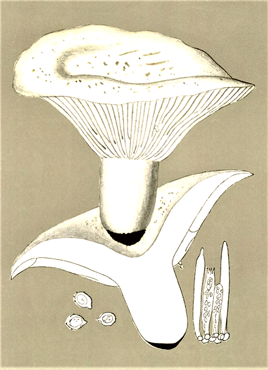 Giacomo Bresadola: Lactarius vellereus (Fr., 1821) Fr. (1838)